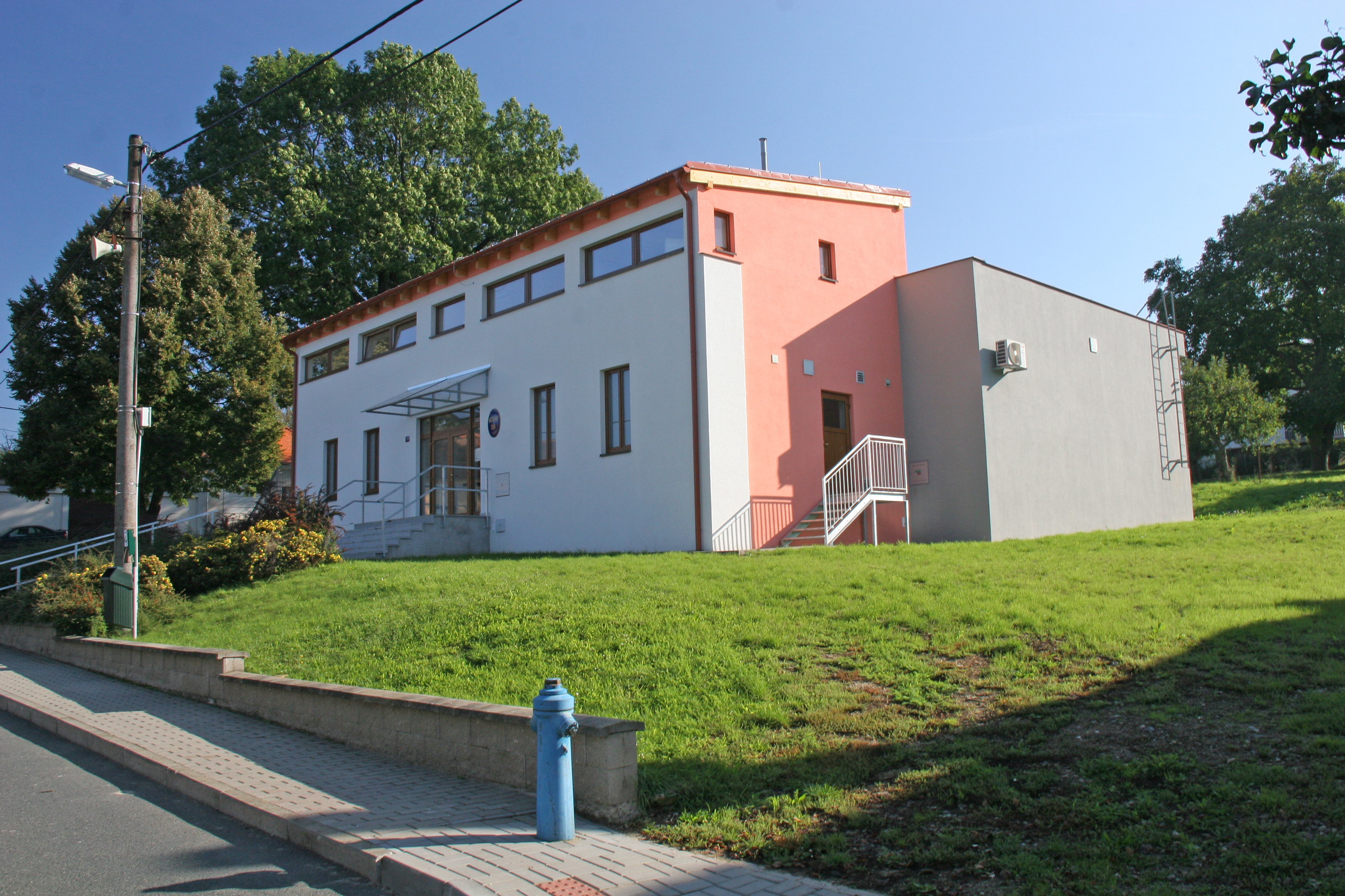 Podmolí kulturní dům